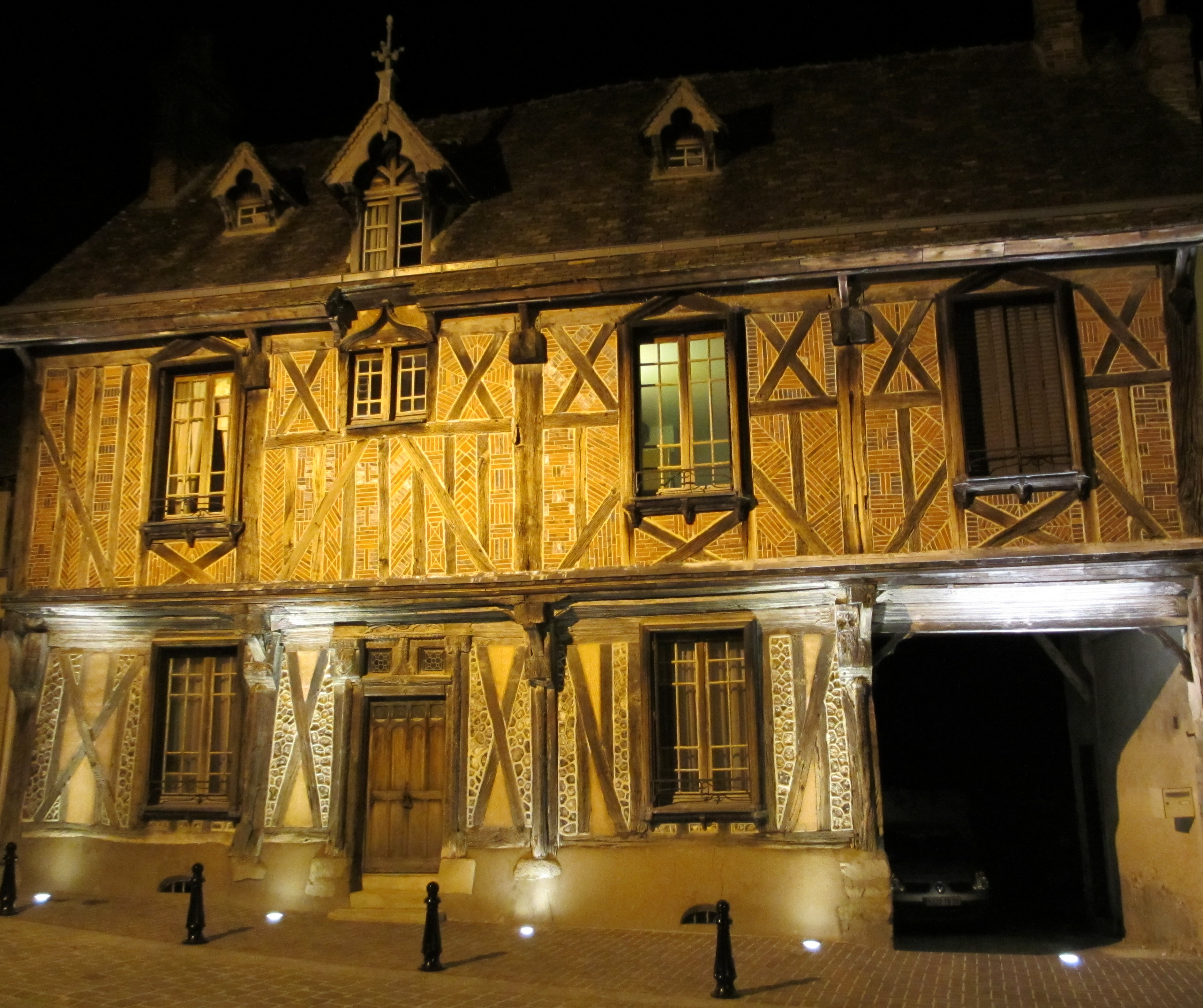 Maison dite de l’archevêque ou de bois à Saint-Julien du Sault (Yonne) France